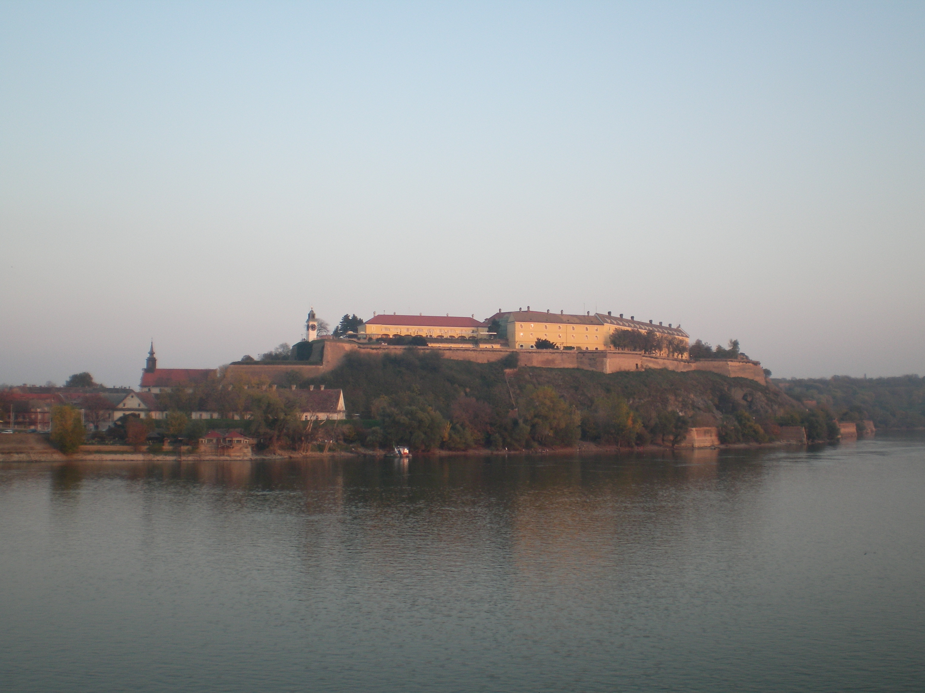 Вид на Петроварадинскую крепость